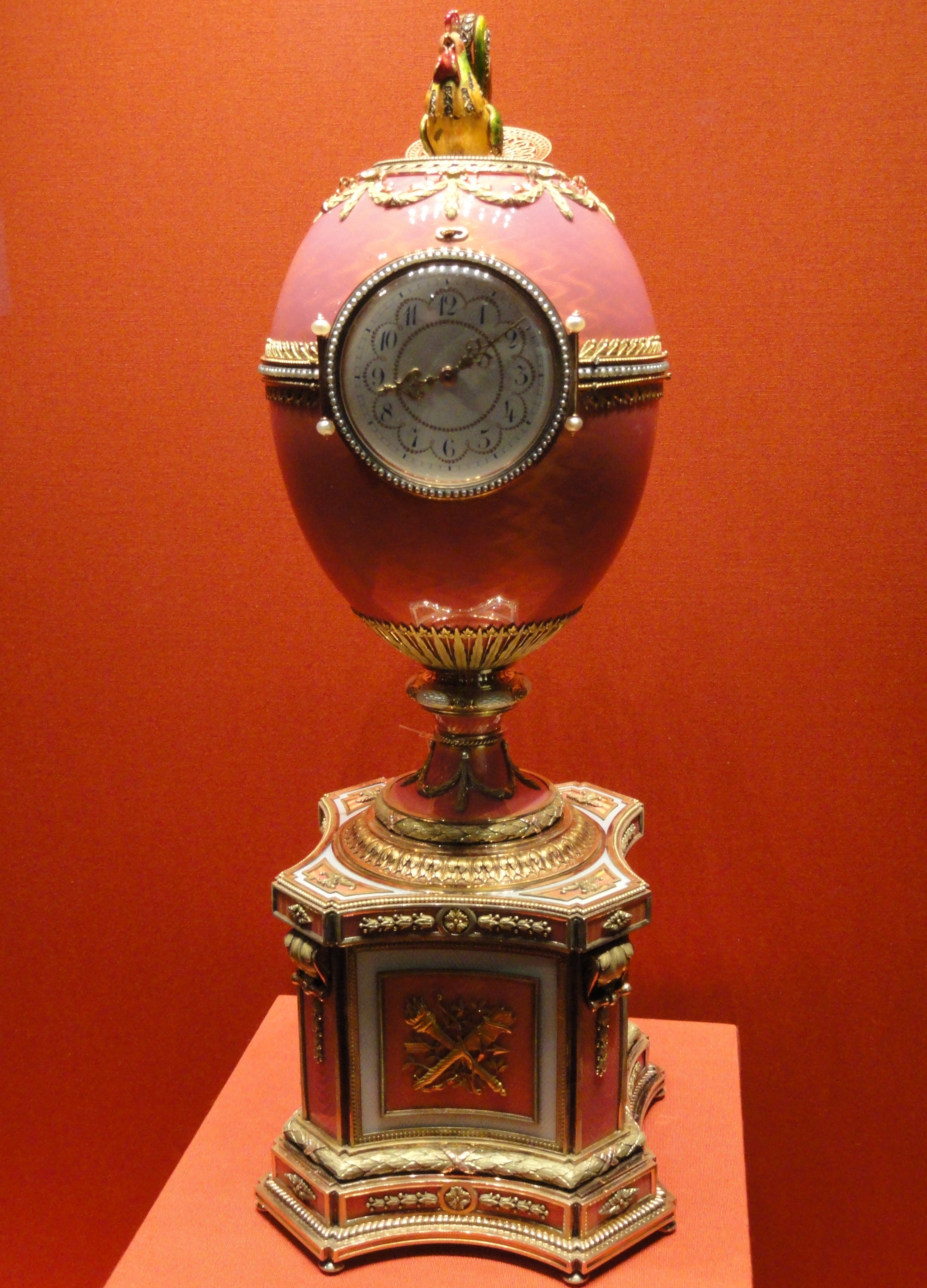 Фотография яйца Фаберже "Ротшильдовское".